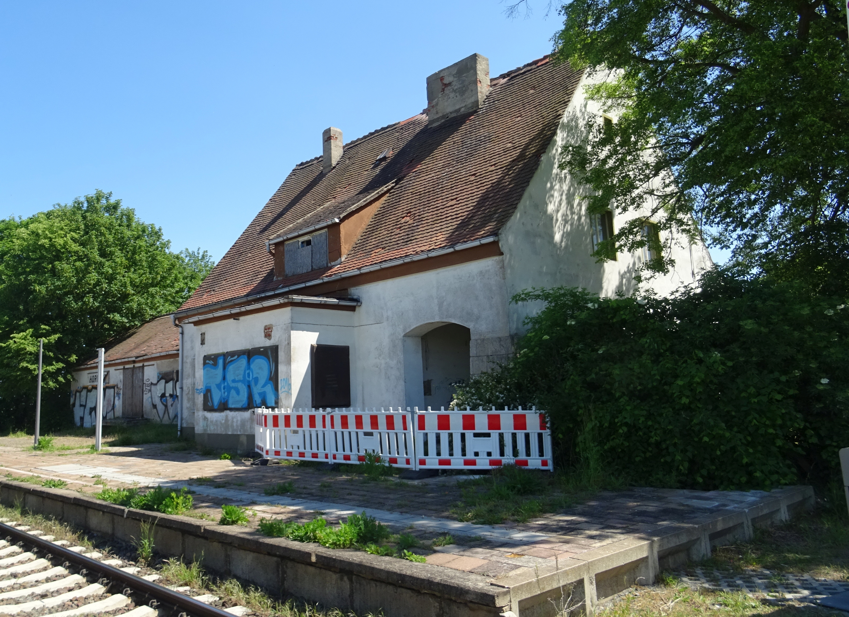 Bahnhof Hordorf, Bahnsteigseite